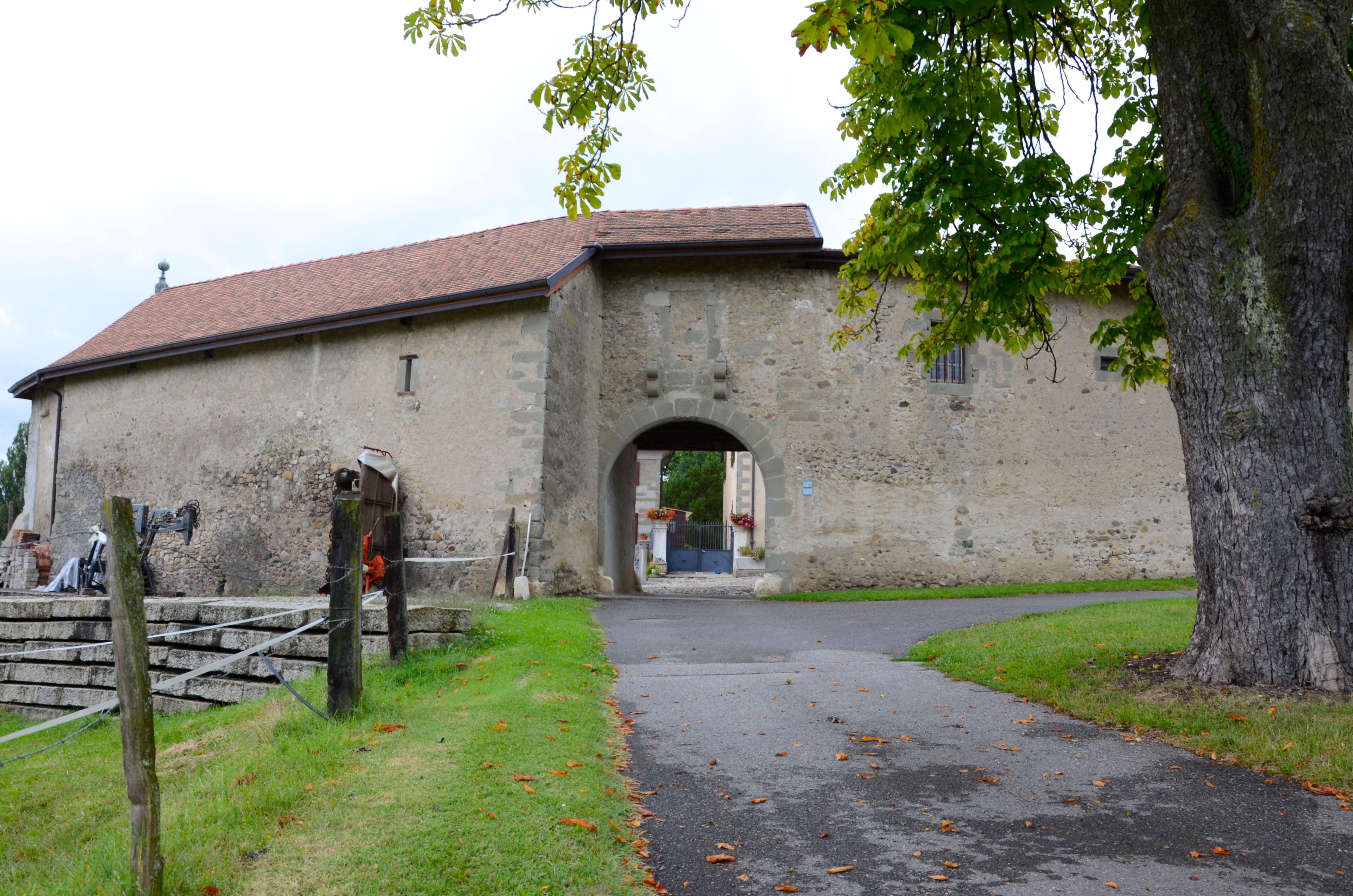 Château de Champlong, Chemin du Cannelet 74-76, Avusy, Genève